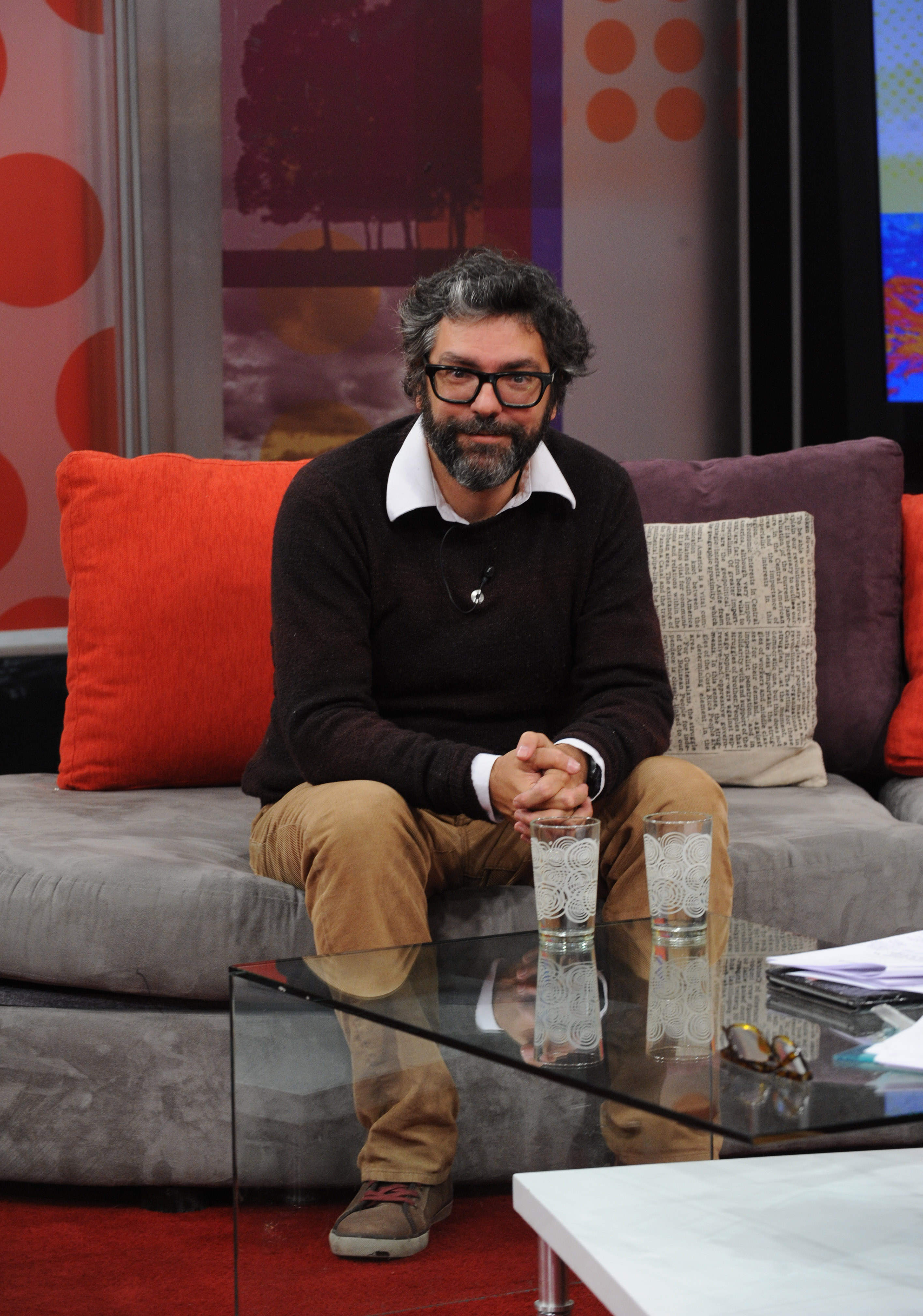 liniers3